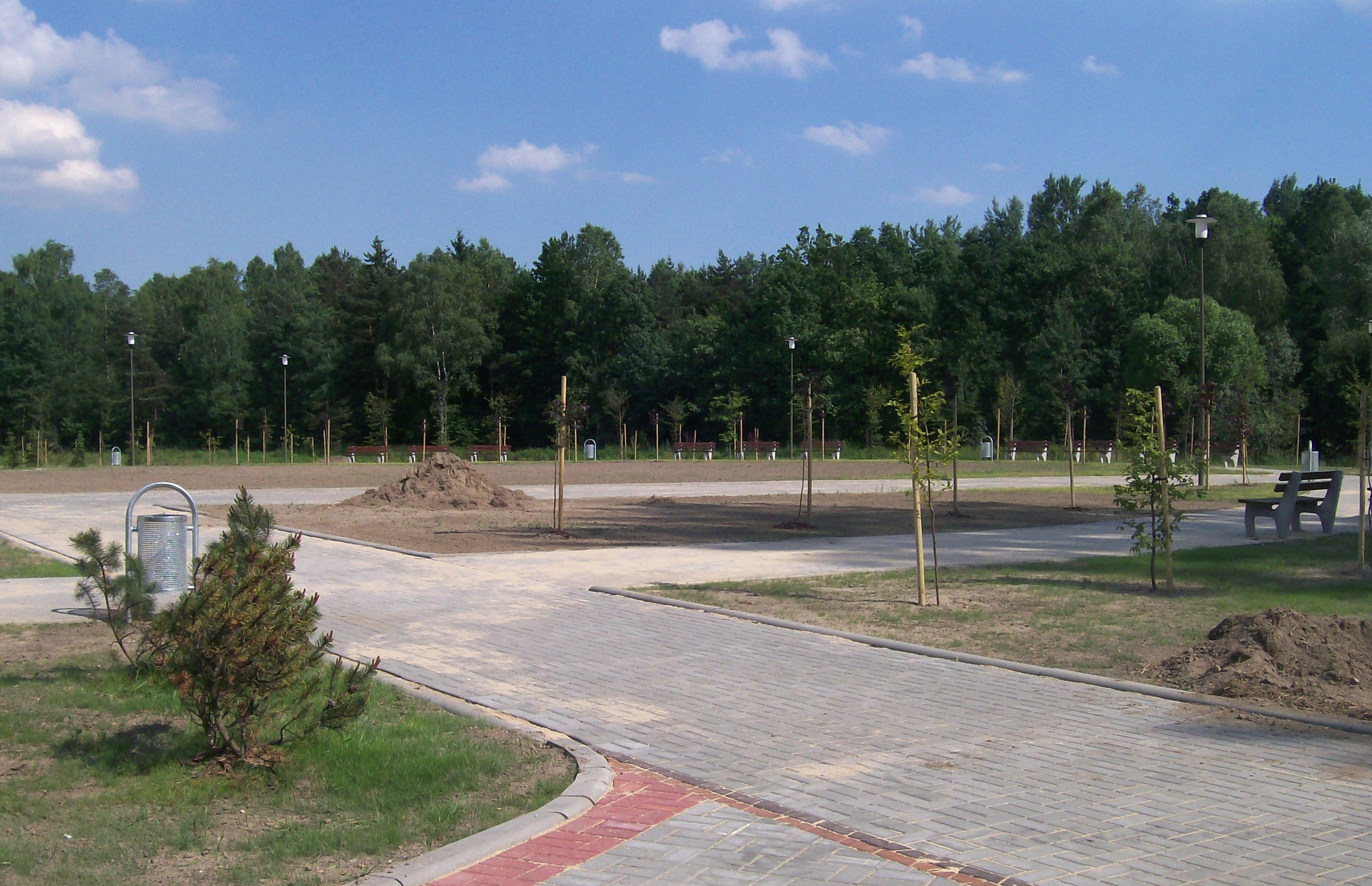 Remont ośrodka wypoczynkowego - Bolina.